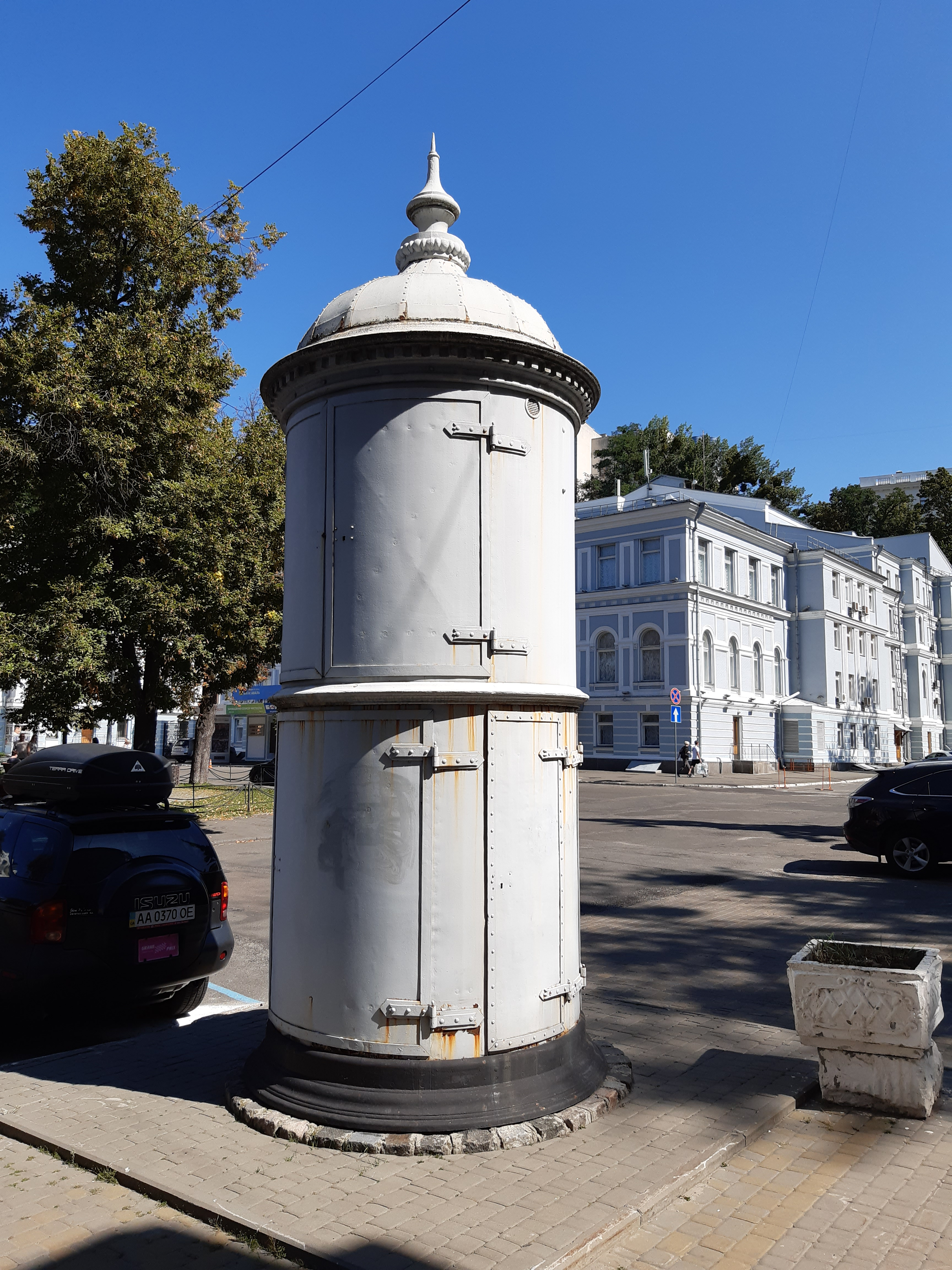 Одна з найперших трансформаторних підстанцій напругою 2,2 кВт/190-110В, які встановлювалися у Києві з 1902 року. Реставрована 2005 року фахівцями "Київенерго" і ВАТ "Будмаш"